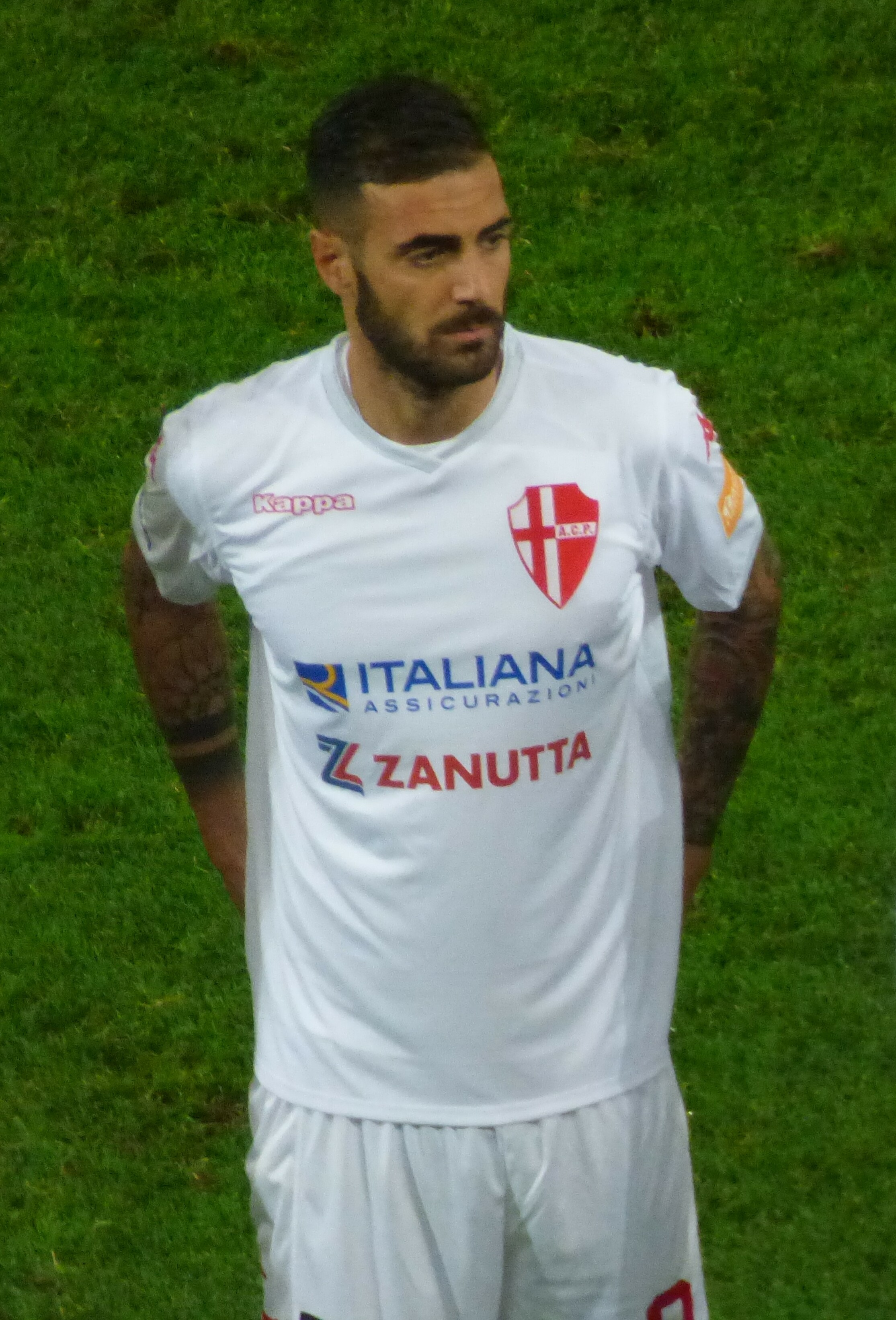 Marco Guidone lors du match amical RC Lens - Calcio Padova, le 11 octobre 2018 au Stade Bollaert-Delelis de Lens.